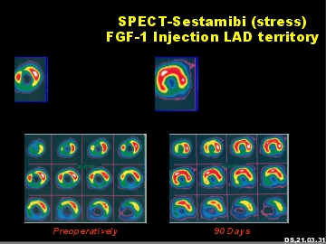 SPECT Darstellung der Angiogenese im Herzen. Szintigraphischer Nachweis der Durchblutungsverbesserung im Herzen nach FGF-1 Injektion.